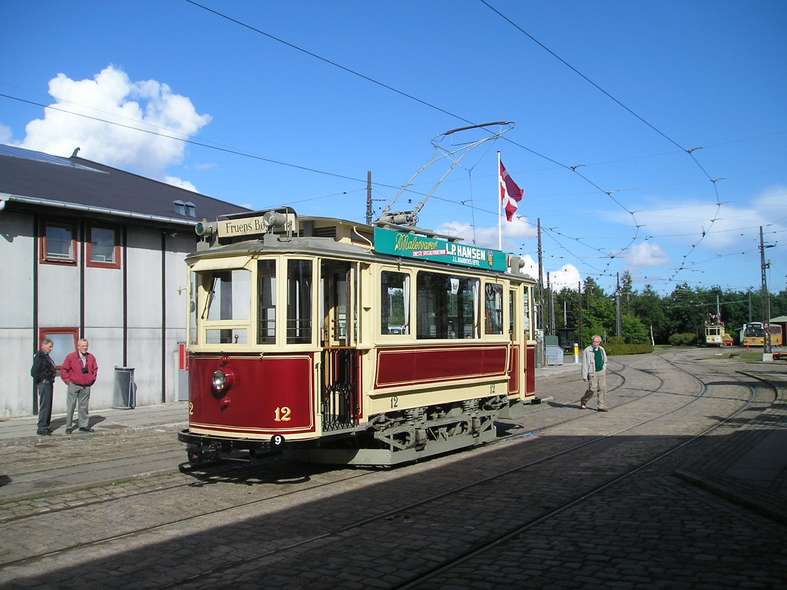 Old Odense tram 12 on the tramwaymuseum Sporvejsmuseet Skjoldenæsholm in Denmark.